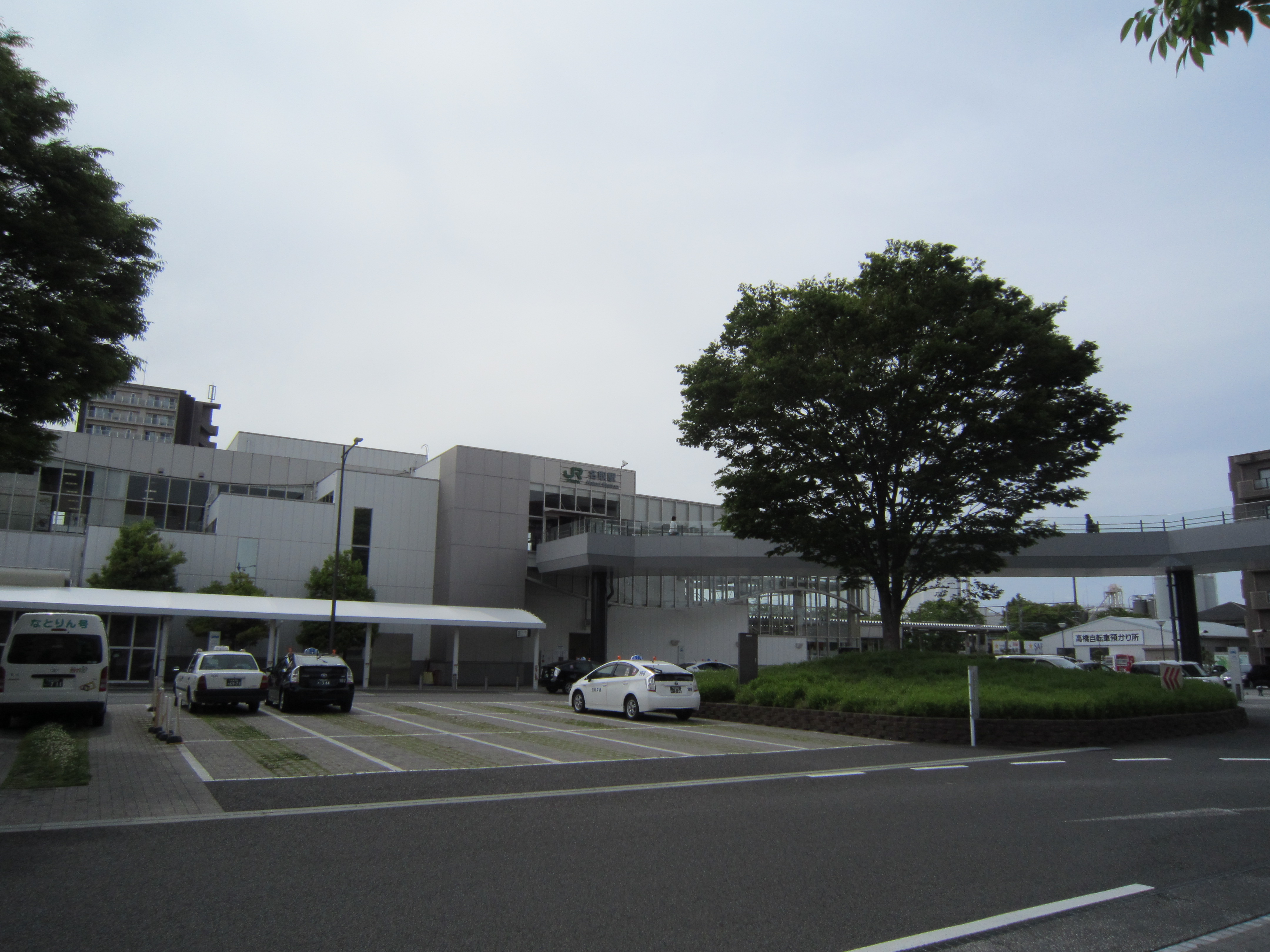 名取駅 東口。ペデストリアンデッキが増設されている。